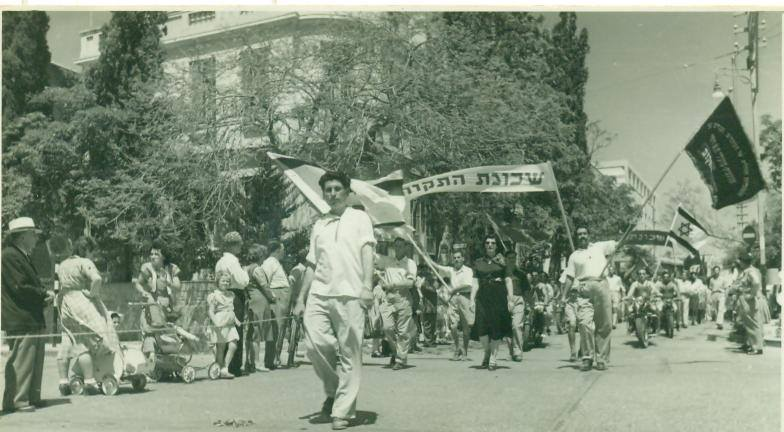 לילי מנחם צועדת במצעד אחד במאי בשנות החמישים בראש הנציגוּת של שכונת התקווה.